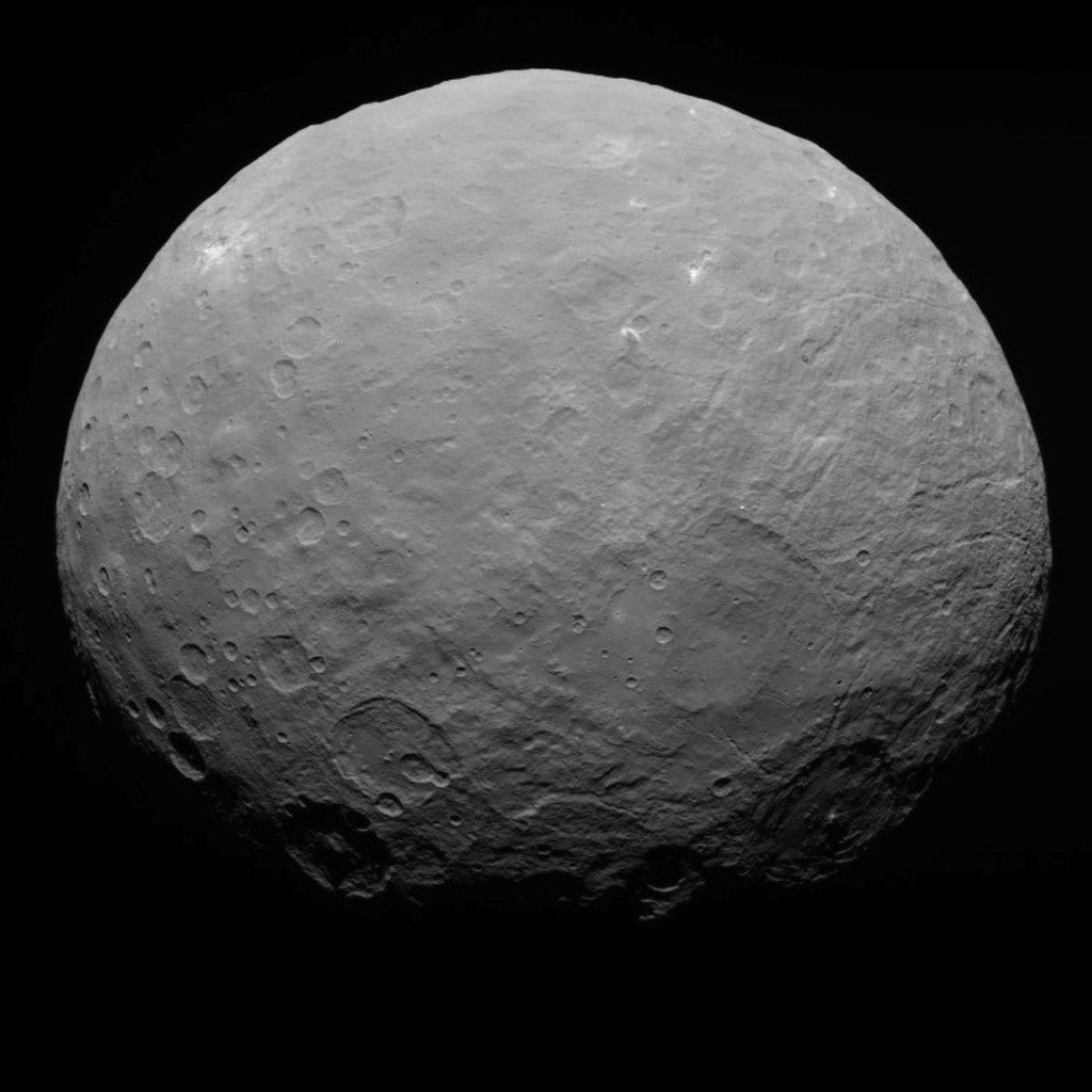 Карликовая планета Церера, первоисточник